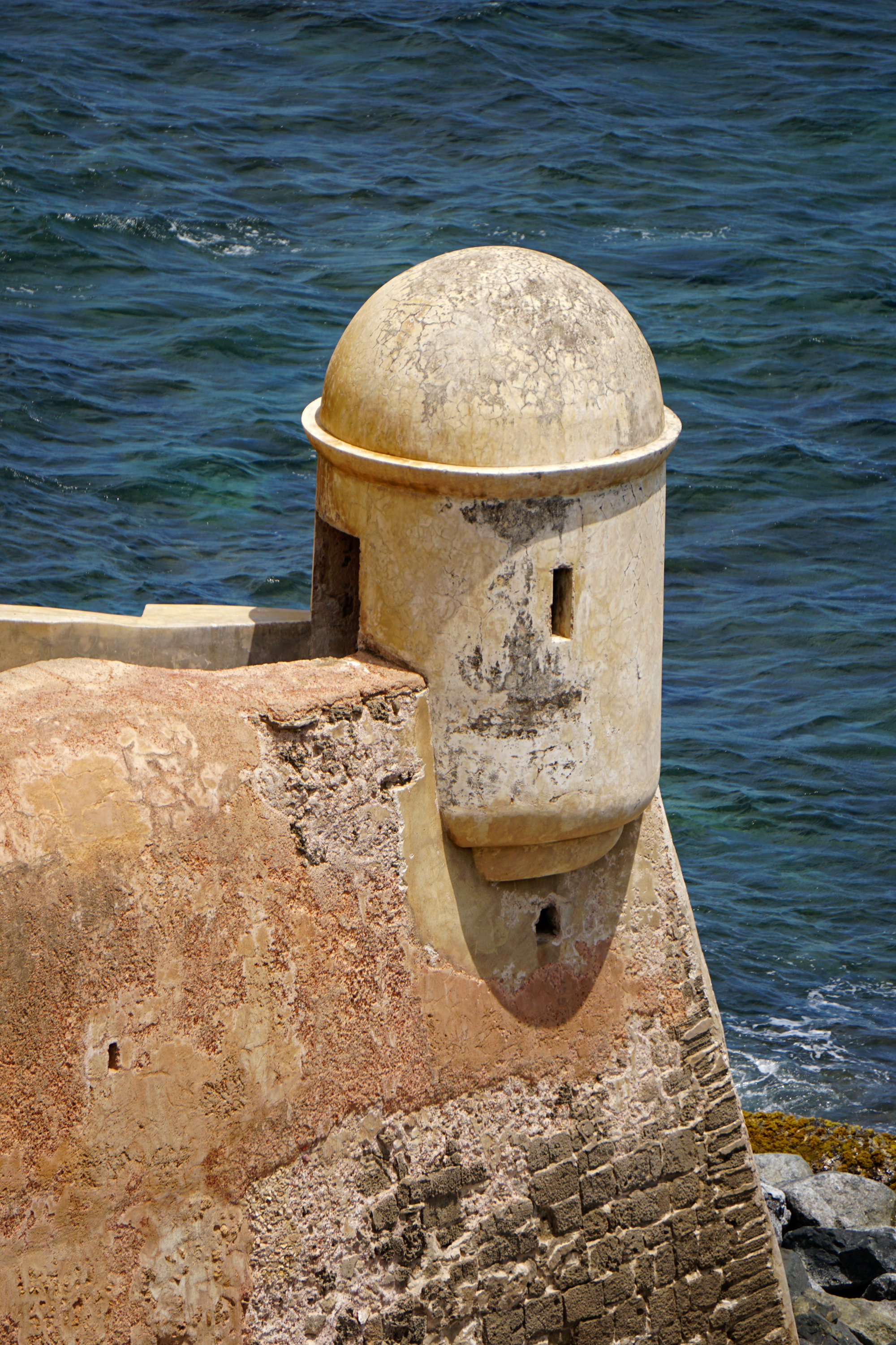 Garita del Diablo, Fortaleza San Cristóbal, Viejo San Juan, Puerto Rico.